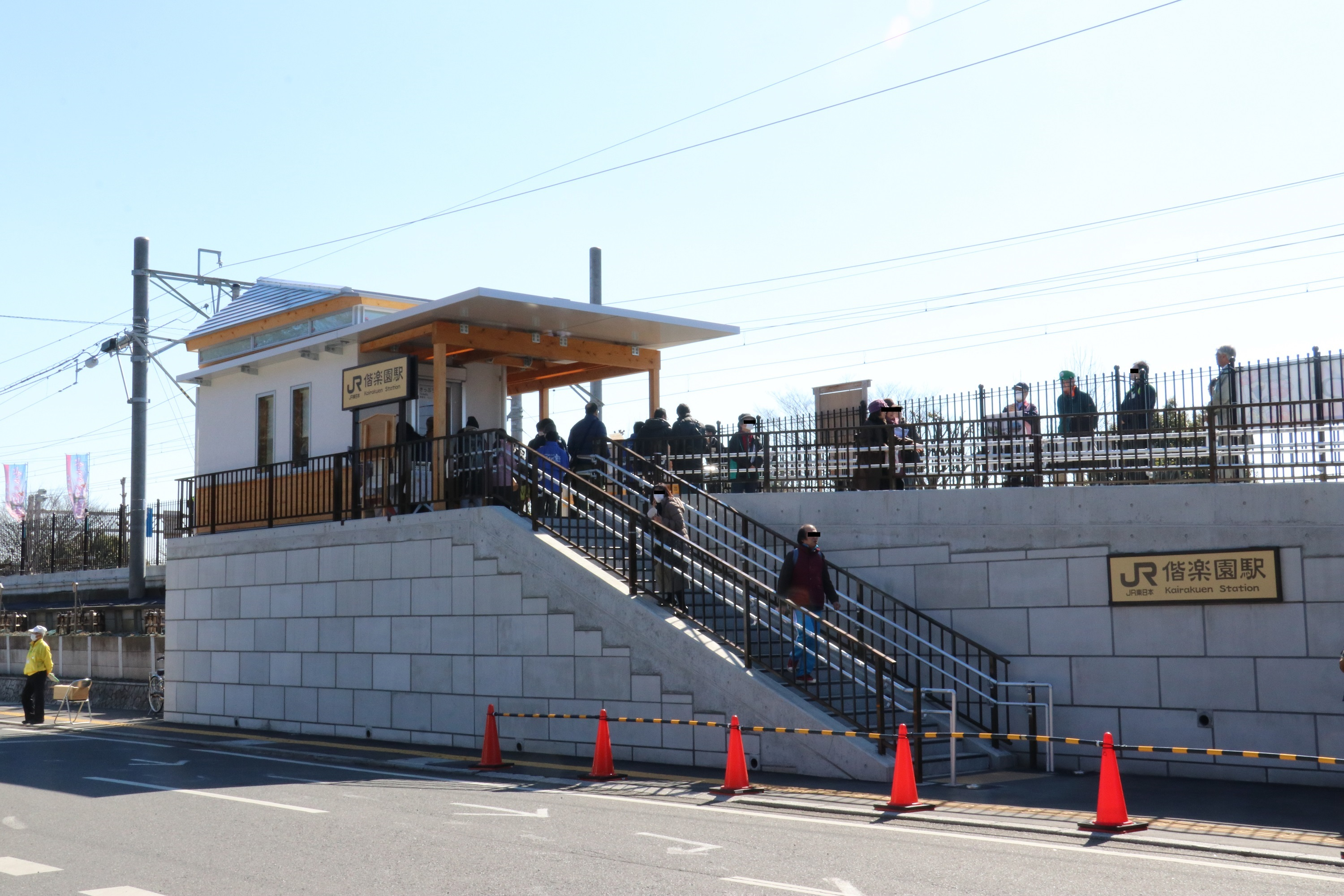 常磐線偕楽園駅